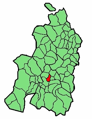 aipaturiko udalerriaren kokapena Nafarroa Beherean